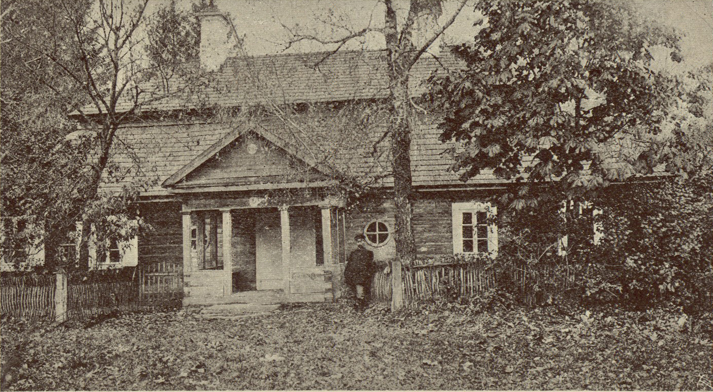 Беларуская (тарашкевіца): Марачоўшчына (Maračoŭščyna), сядзіба Касьцюшкаў (Kaściuška)